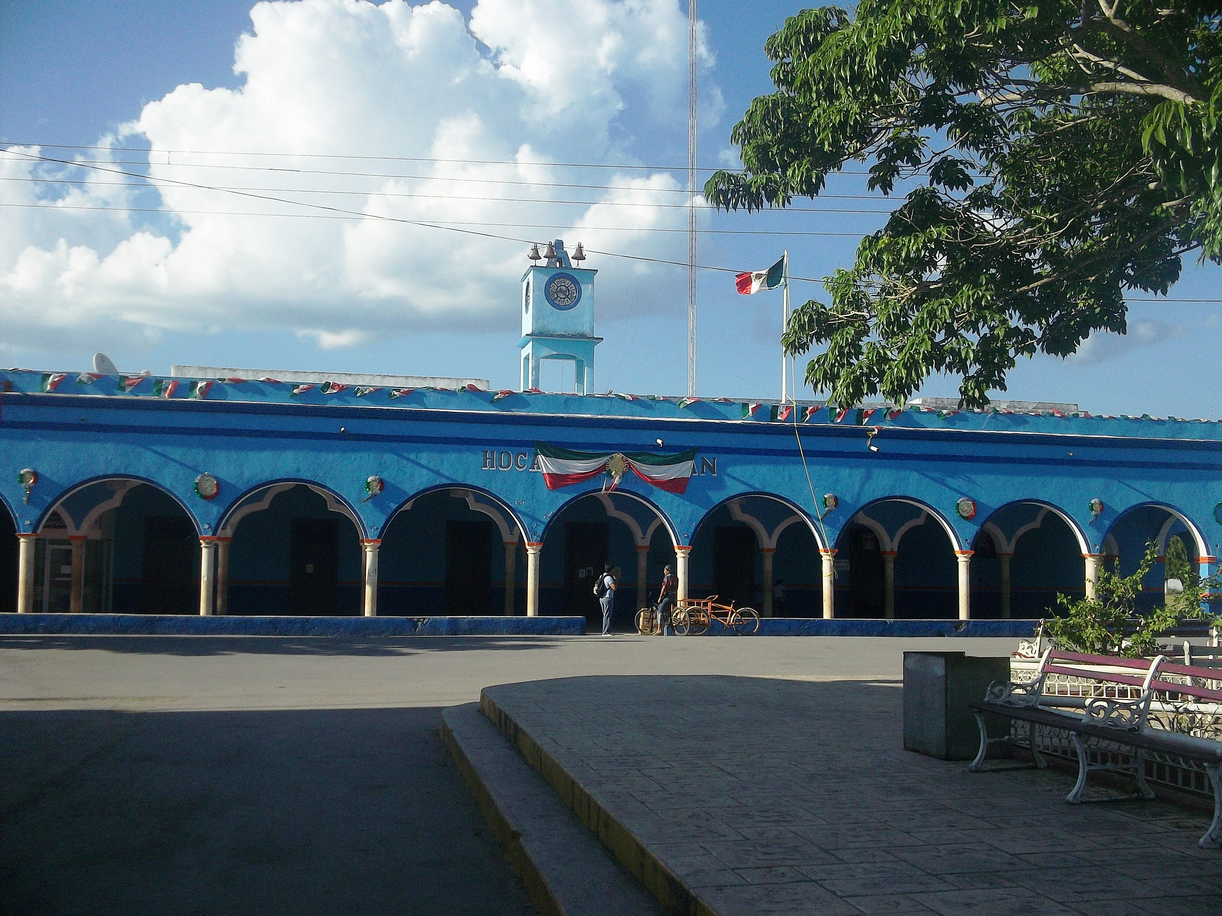 Palacio muncipal de Hocabá, Yucatán.